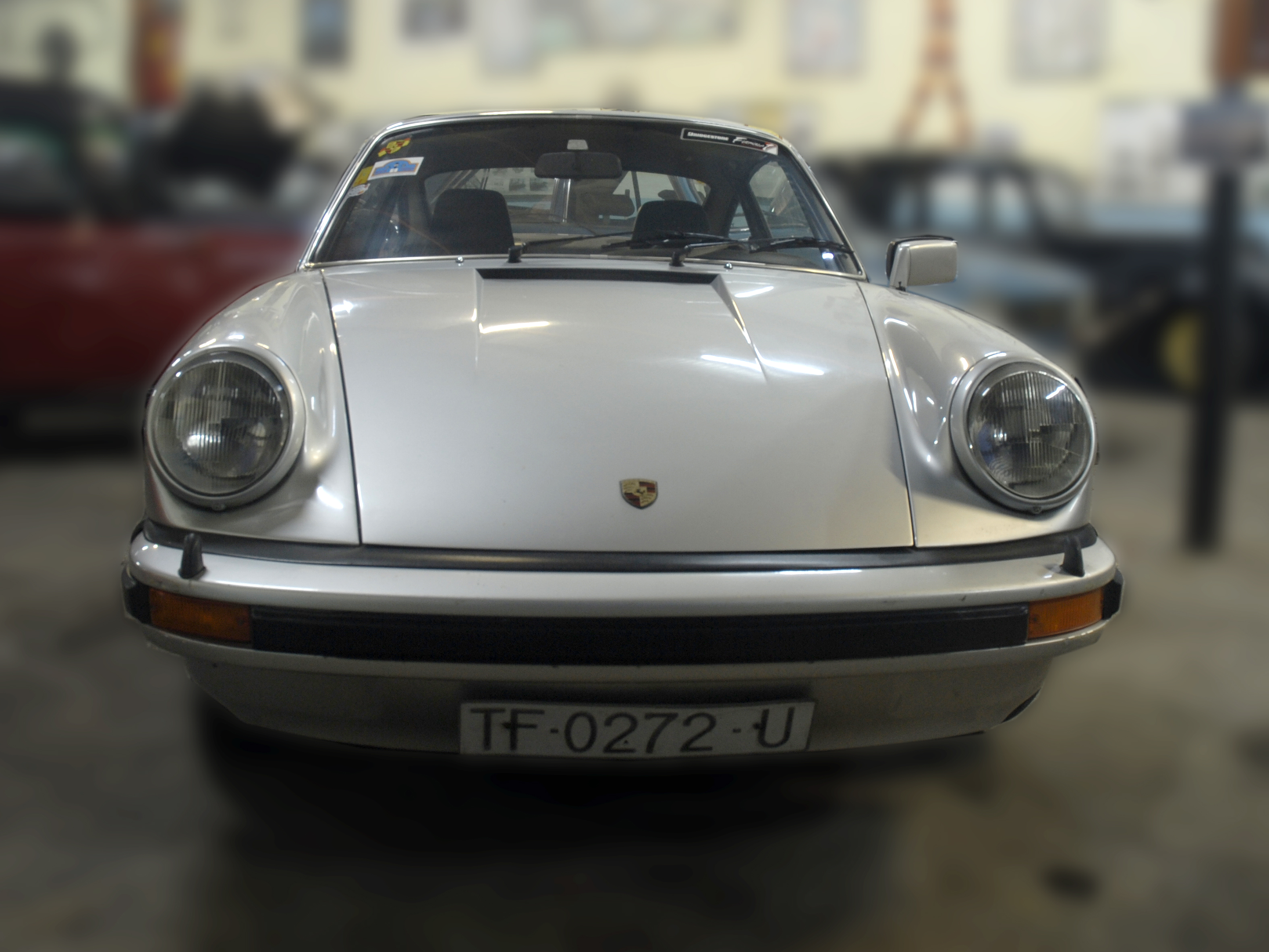 Museo Historia del Automóvil en Melilla Siglo XX